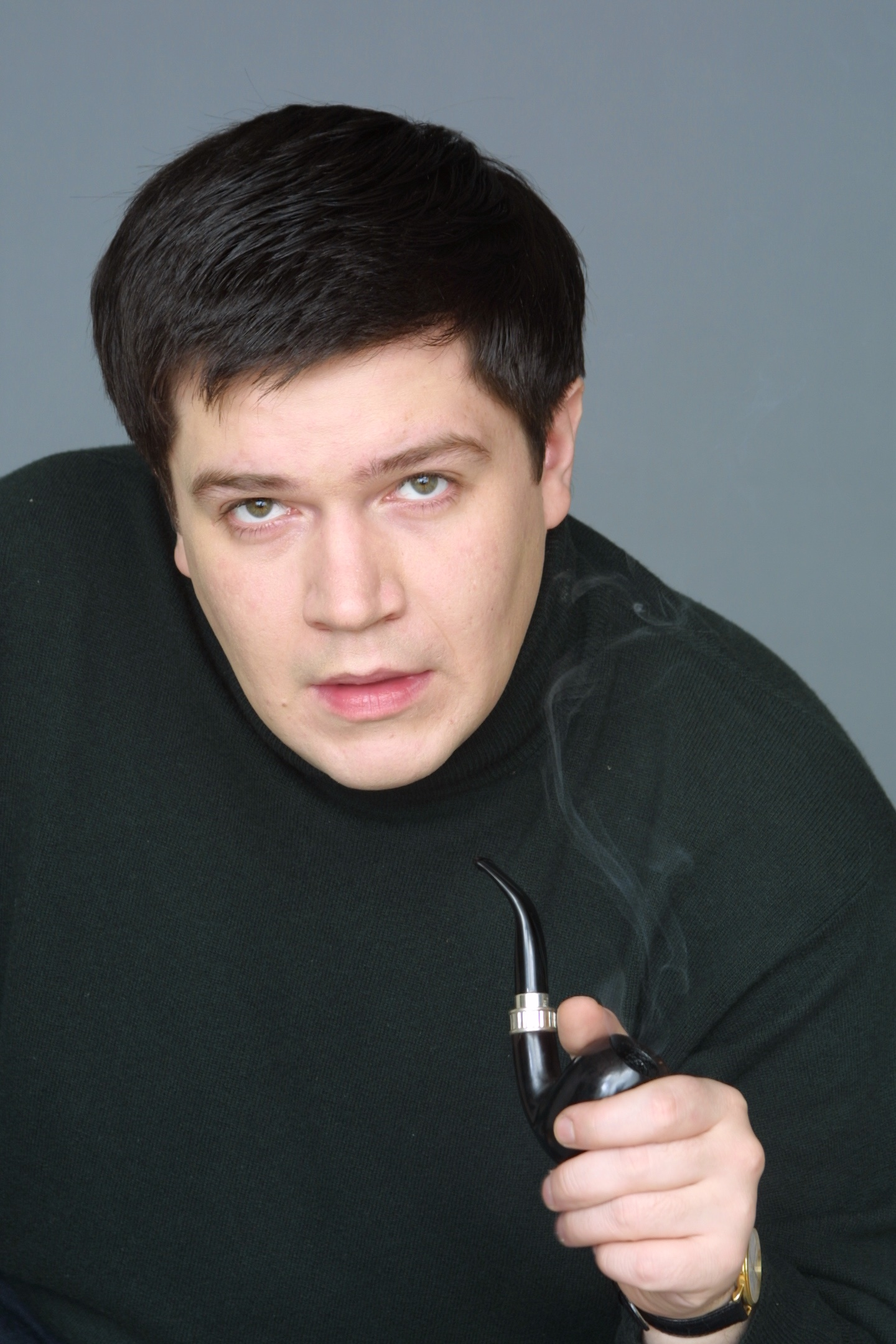 Илья Калинников, лидер группы "Високосный Год"